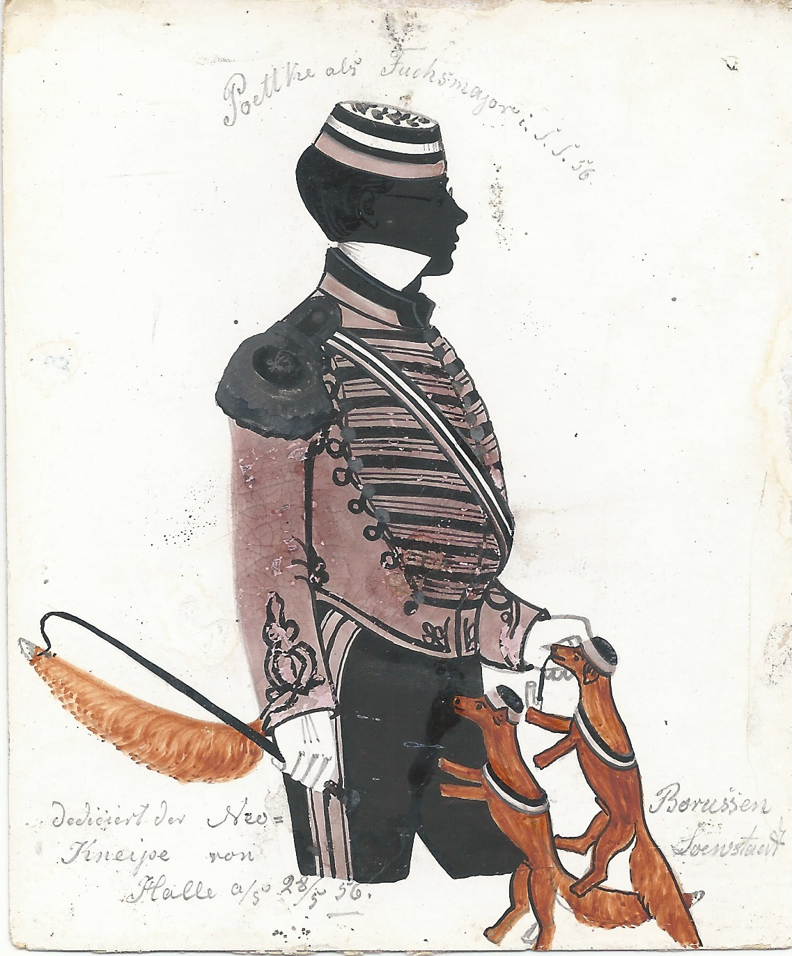 Hermann Poettke i. S. S. 56, als Fuchsmajor im Jahr 1856, Neu-Borussen, Kneipe von Loewstadt, Halle. Archiv des Corps Saxonia Konstanz Nr. C/II/a_[73]